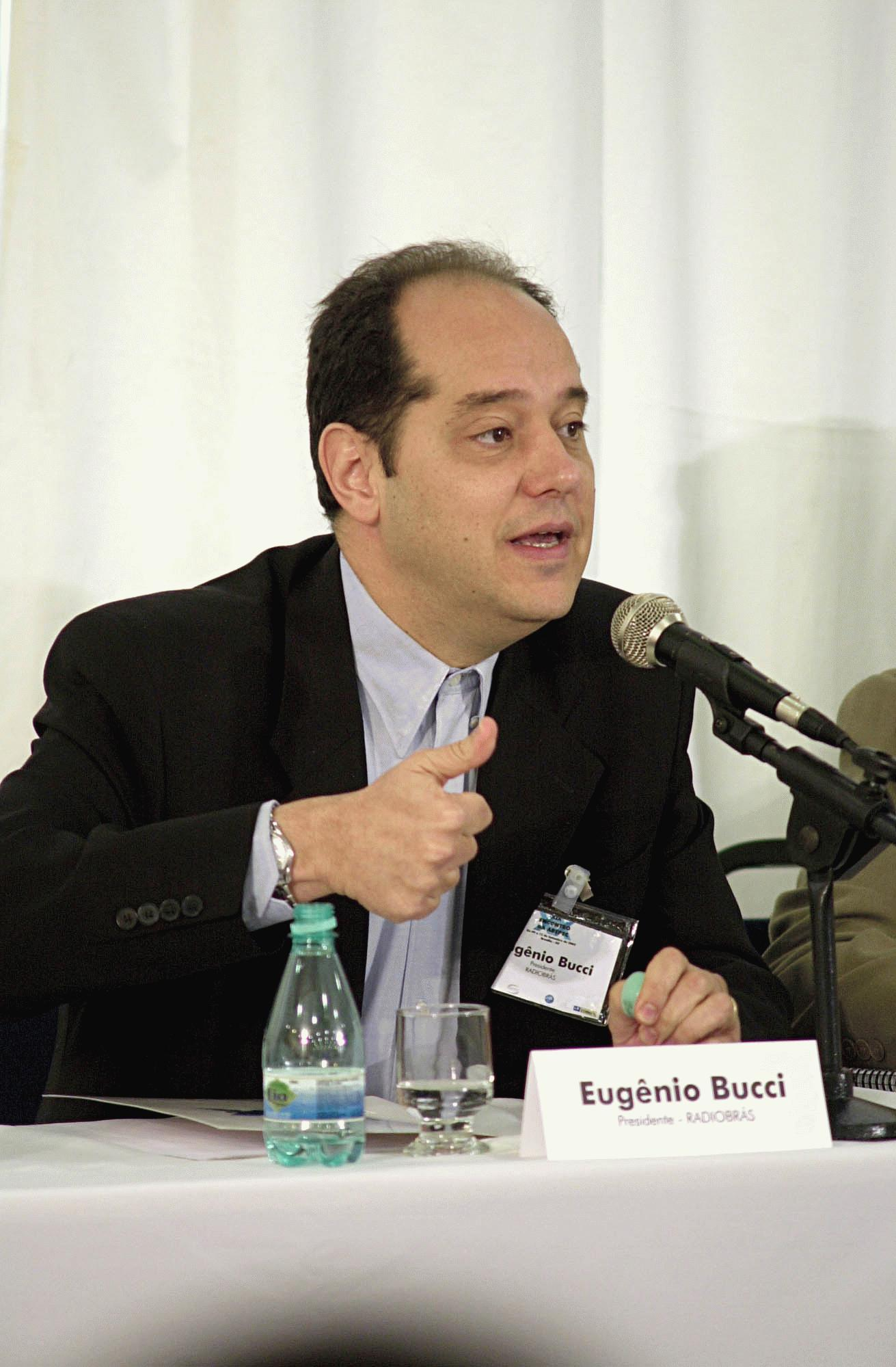 Brasília - O presidente da Radiobrás, Eugênio Bucci, fala durante encontro no Hotel Manhattan. (foto: Lindomar Cruz - ABr - vert. 20)